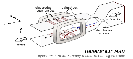 Schéma d'un générateur MHD typique. Modèle à tuyère linéaire de Faraday à électrodes segmentées.